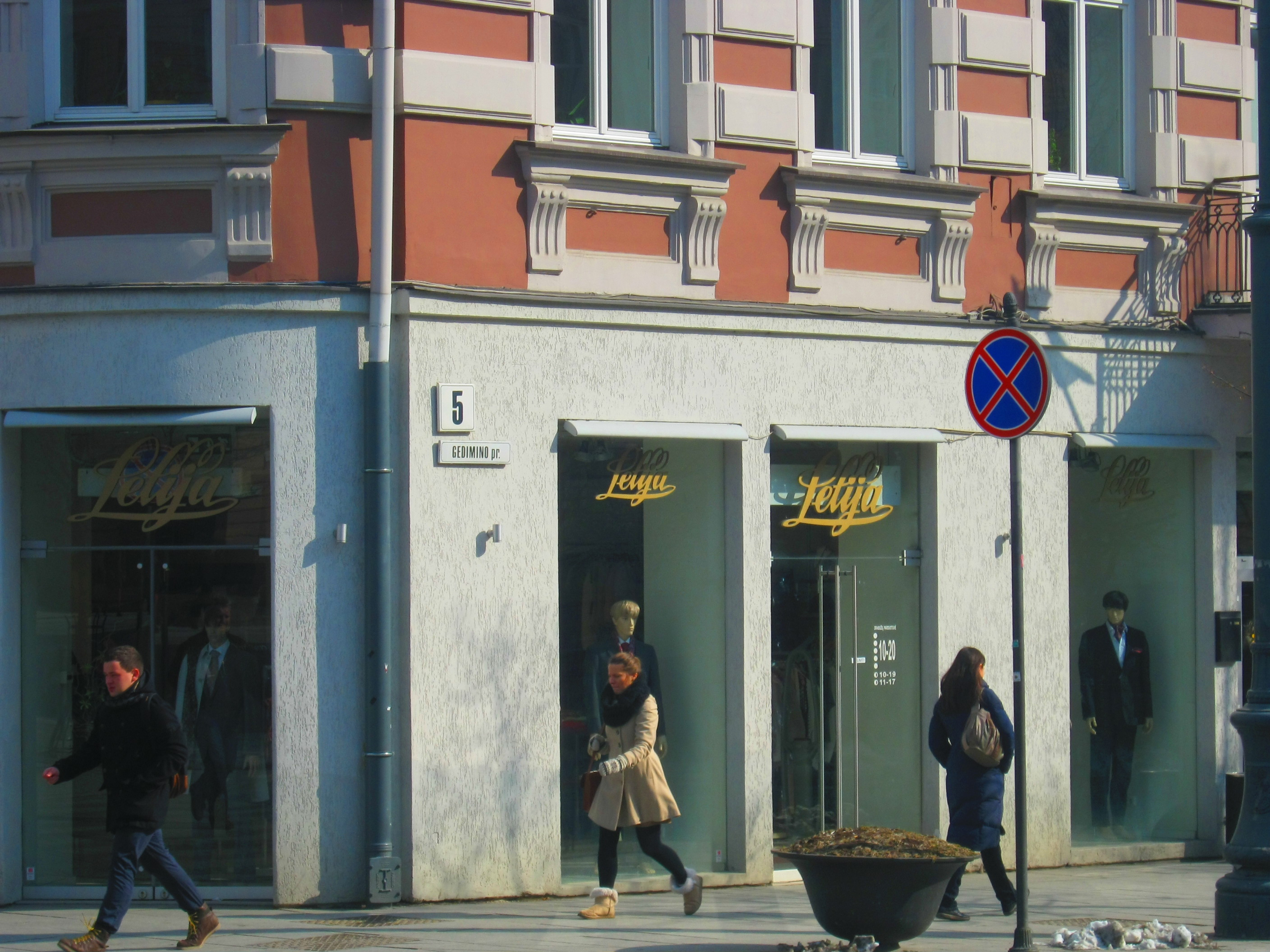 Parduotuvė Lelija